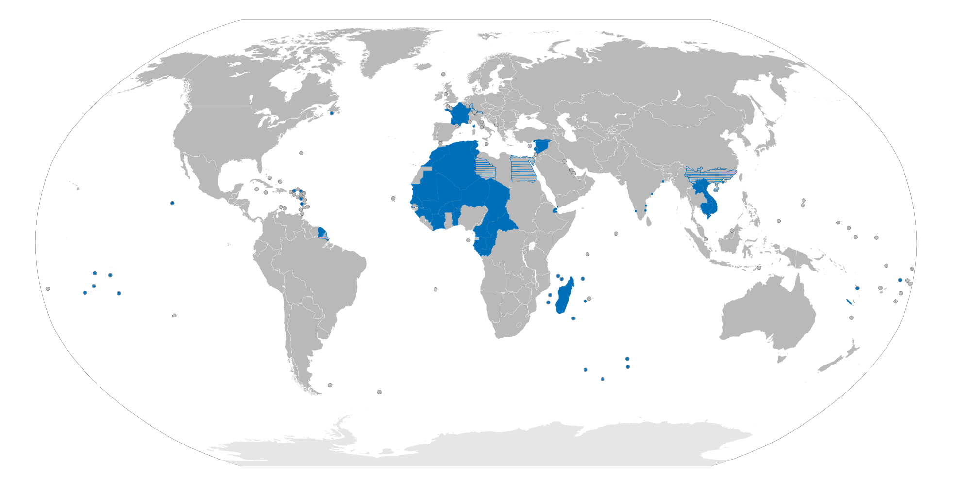 Carte de l'empire français en 1946